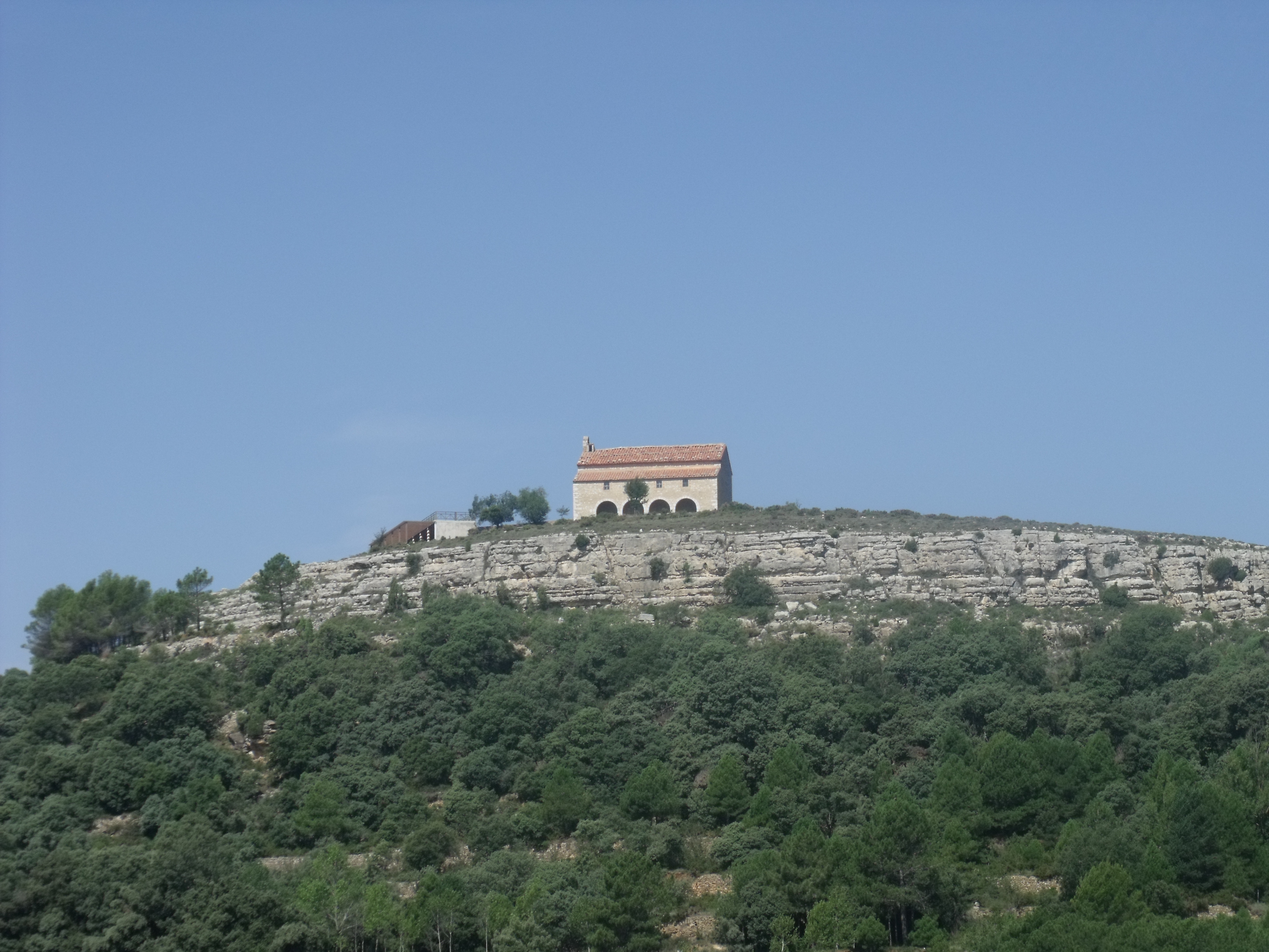 Ermita de Sant Cristòfol de Culla.